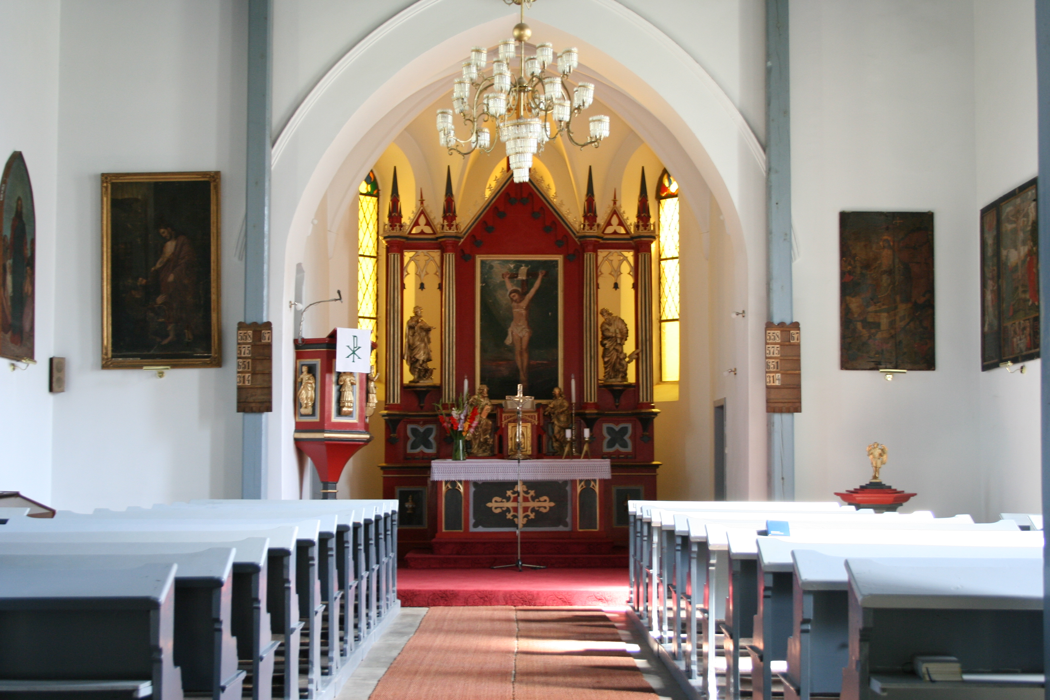 Nidzica, kościół ewangelicko-augsburski, 1858-1890